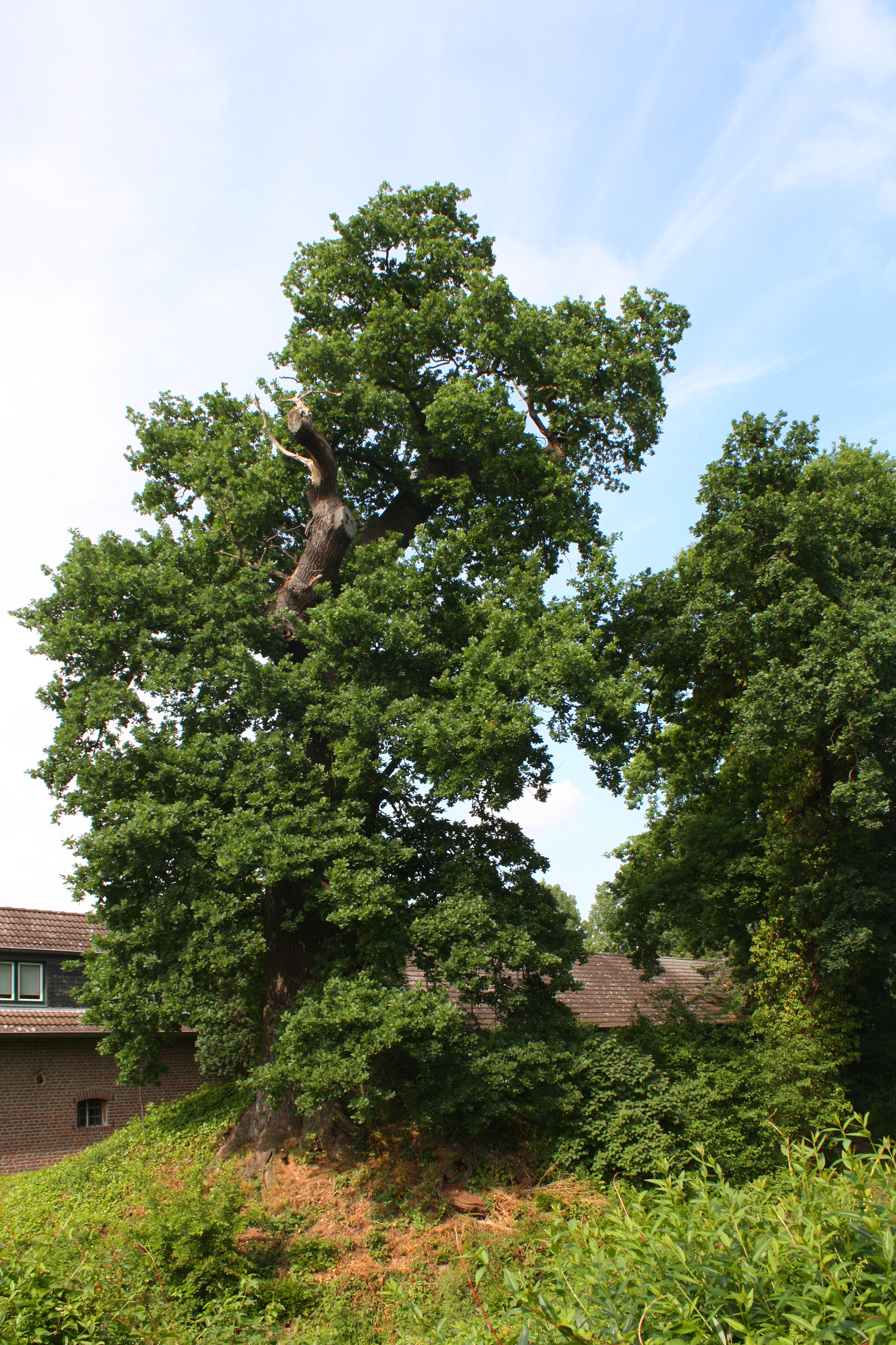 Burg Konradsheim, Naturdenkmal 650jährige Eiche